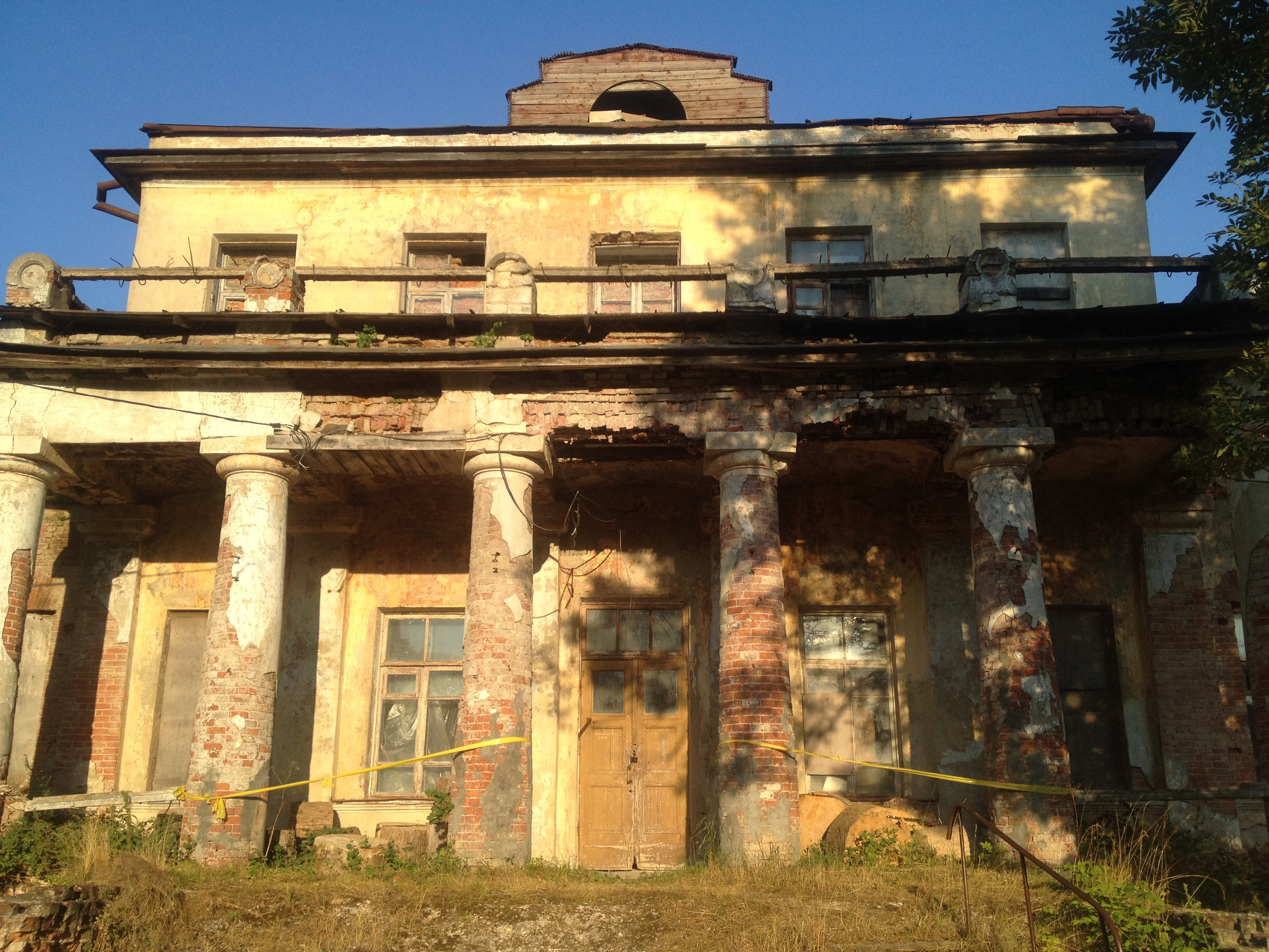 Усадьба Мирковича А. Я. (Тульская область, Суворов, село Николо-Жупань)